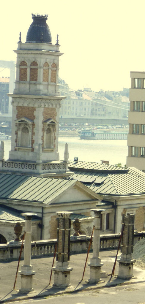 Várkert kioszk (Budapest 1, Ybl Miklós tér)